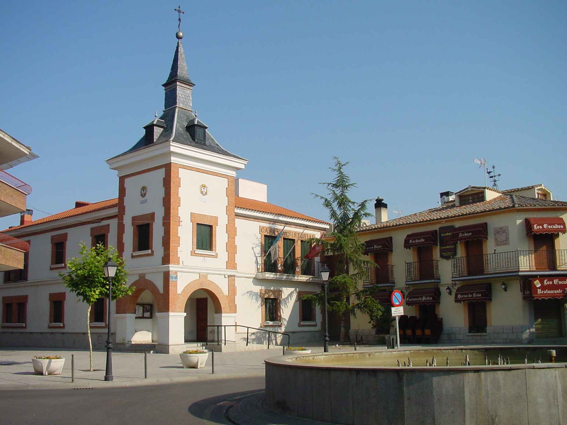 Ayuntamiento de Fuente el Saz de Jarama.